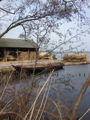 Vinkeveenseplassen in Vinkeveen